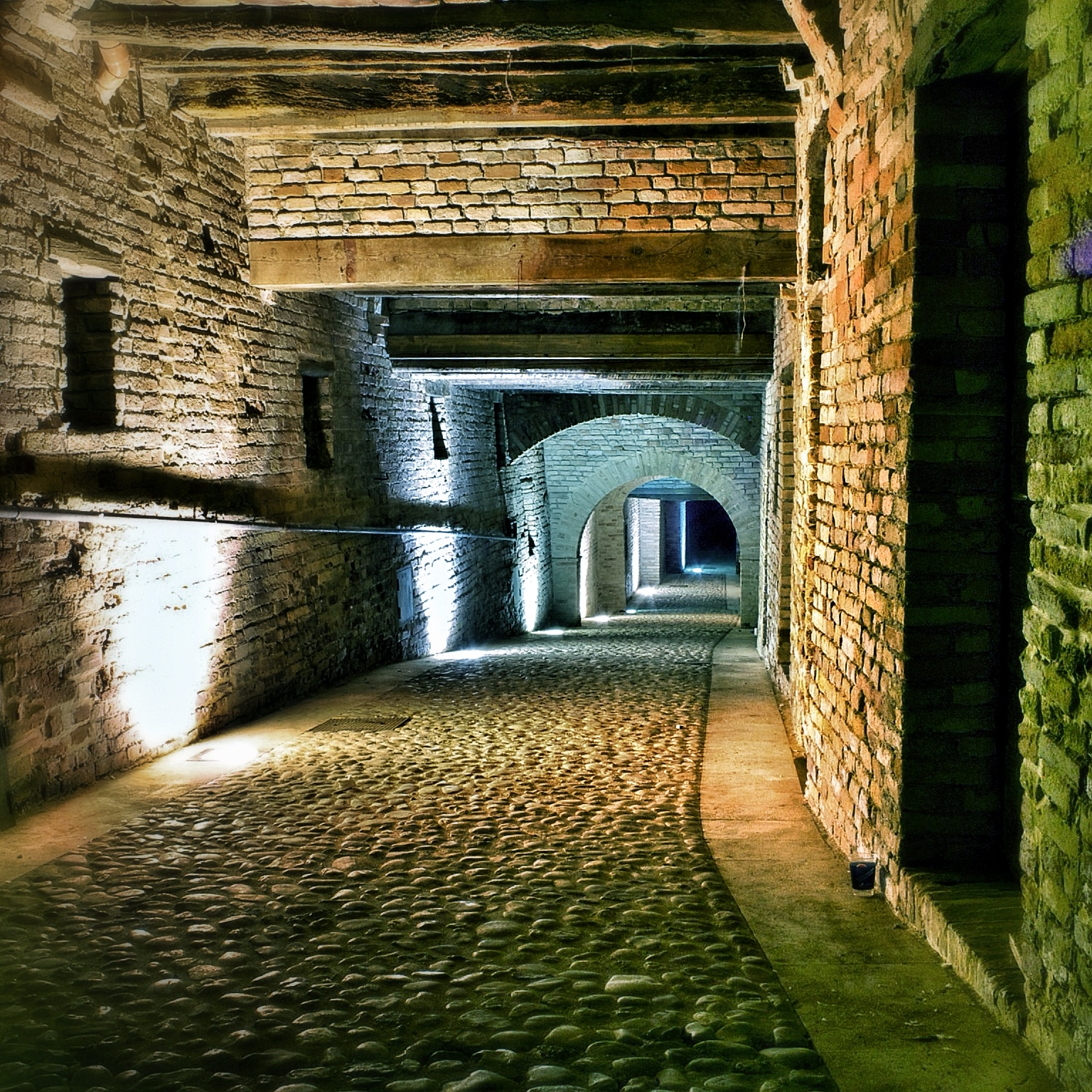 I camminamenti militari: edificati tra il Trecento e il Quattrocento, rappresentano il luogo più suggestivo di Carassai, sono in sostanza un passaggio semi sotterraneo per le truppe che ha preso la forma attuale quando, nel ‘500, fu autorizzata dalle autorità Fermane la costruzione di case a ridosso delle mura cittadine.